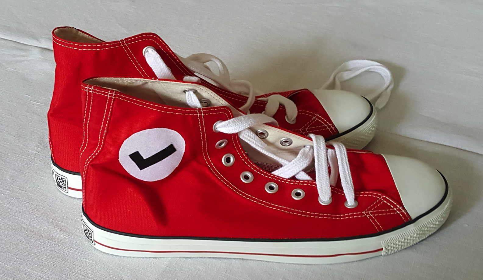 "Hakenschuhe" der Crowdfunding-Kampagne von "Hooligans gegen Satzbau, Deutschland 2016